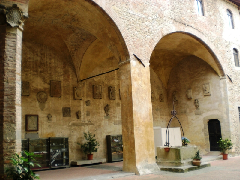 Interno di un palazzo in centro del paese